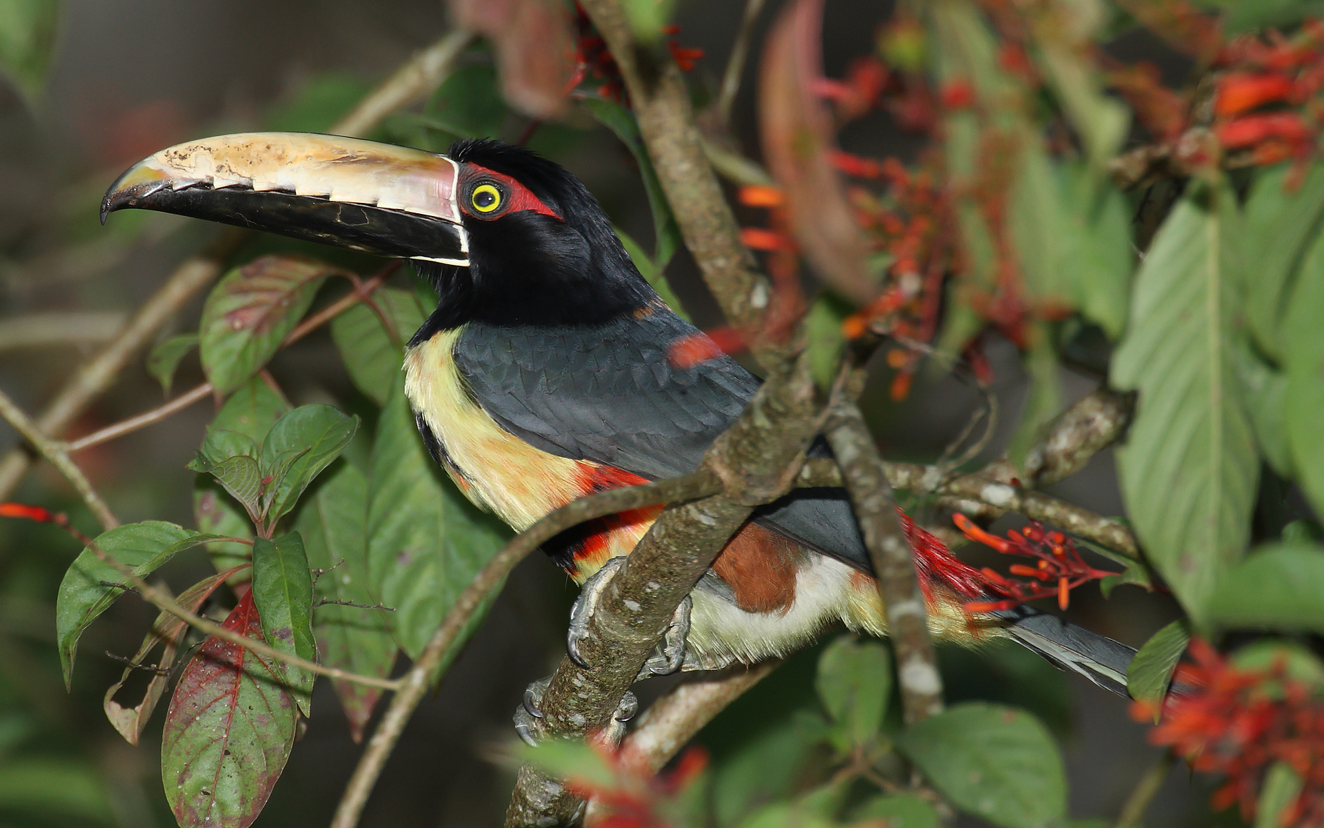 Collared Aracari -- Parque Nacional Darién, Panama -- 2008 February